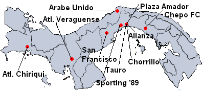 Equipos de la Anaprof 2007